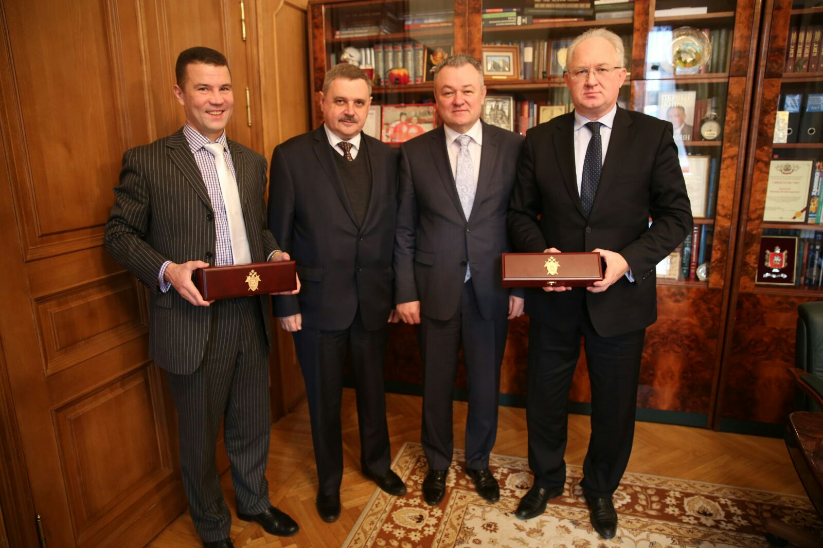 Заместитель председателя Следственного комитета РФ А.В. Федоров и Ректор МГЮА, Председатель Ассоциации юристов России В.В. Блажеев вручают С.В. Алексееву и его заместителю В.Ю. Каткову наградное оружие Следственного комитета Российской Федерации